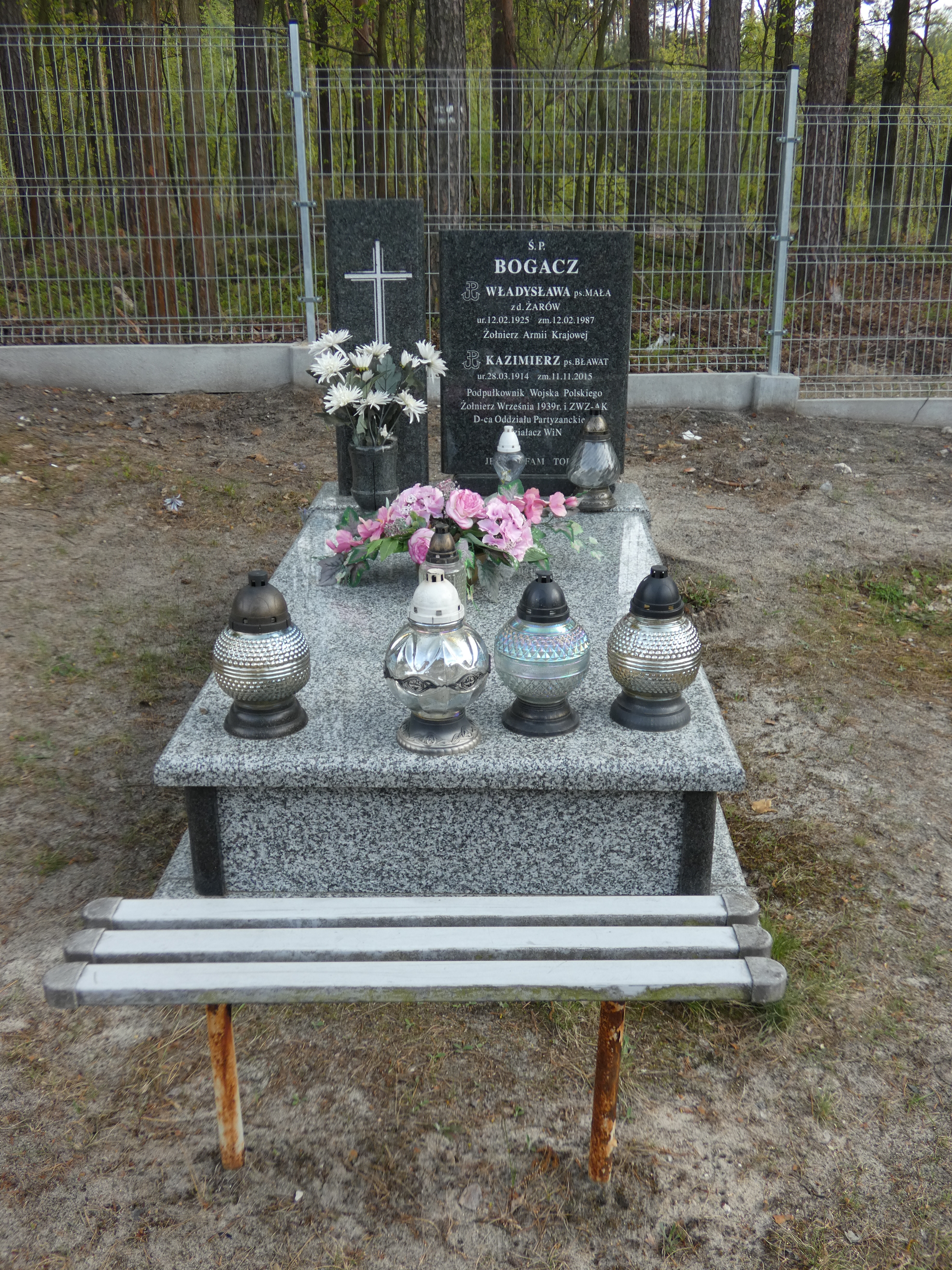 Nagrobek Kazimierza Bogacza, Nowa Dęba, 2020-05-03